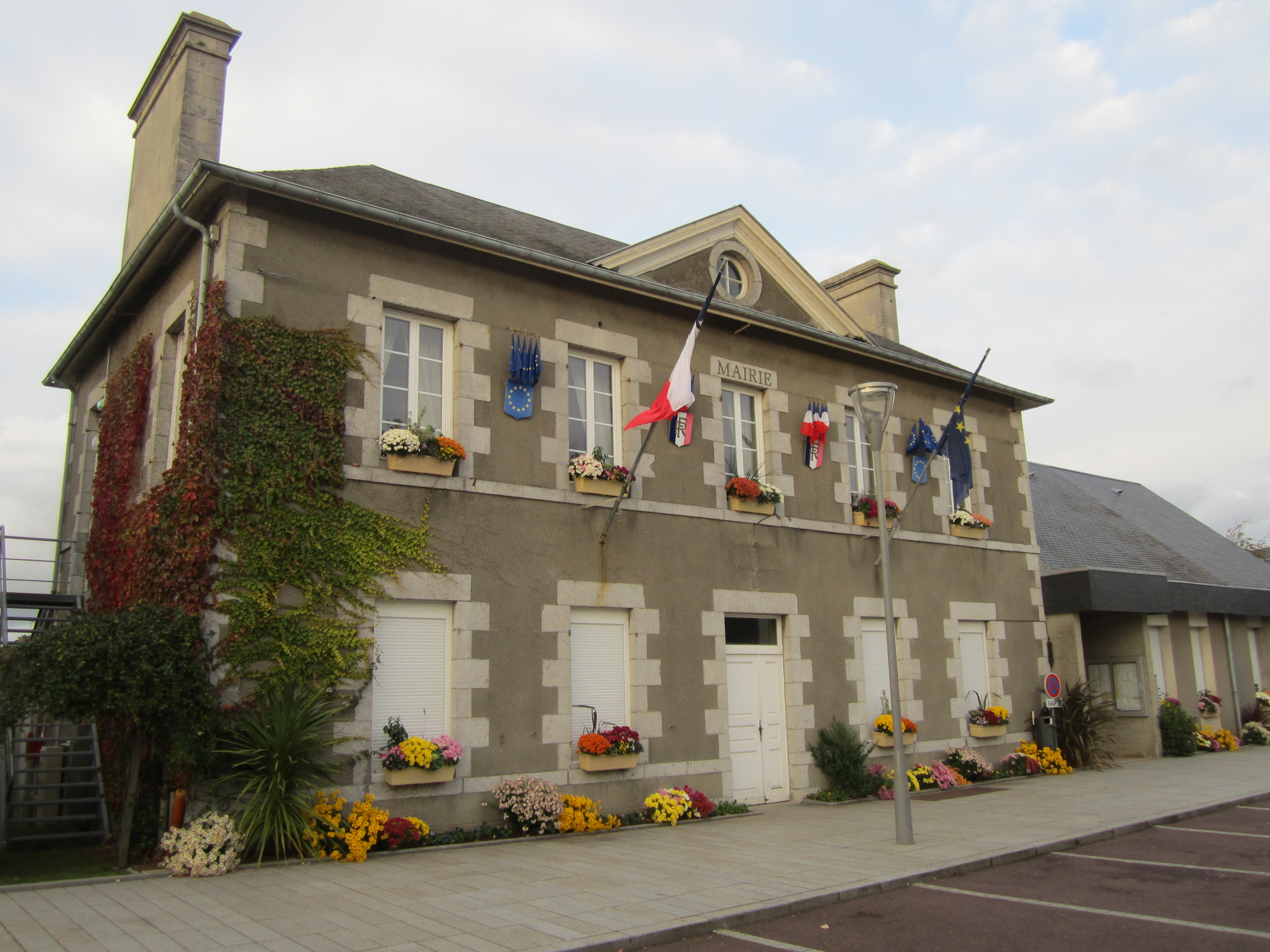 Agon-Coutainville, Manche